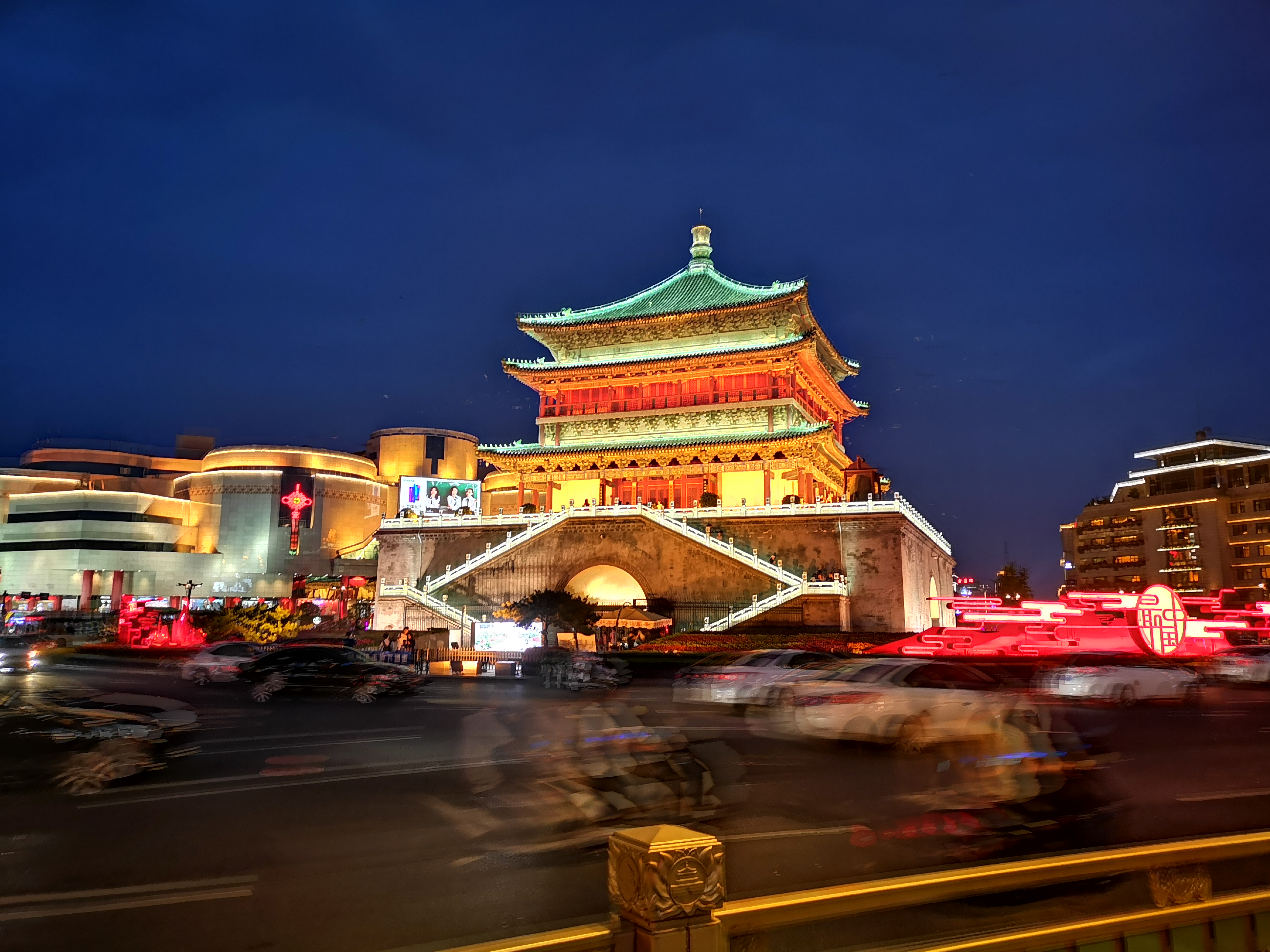 中文（中国大陆）: 西安钟楼夜景